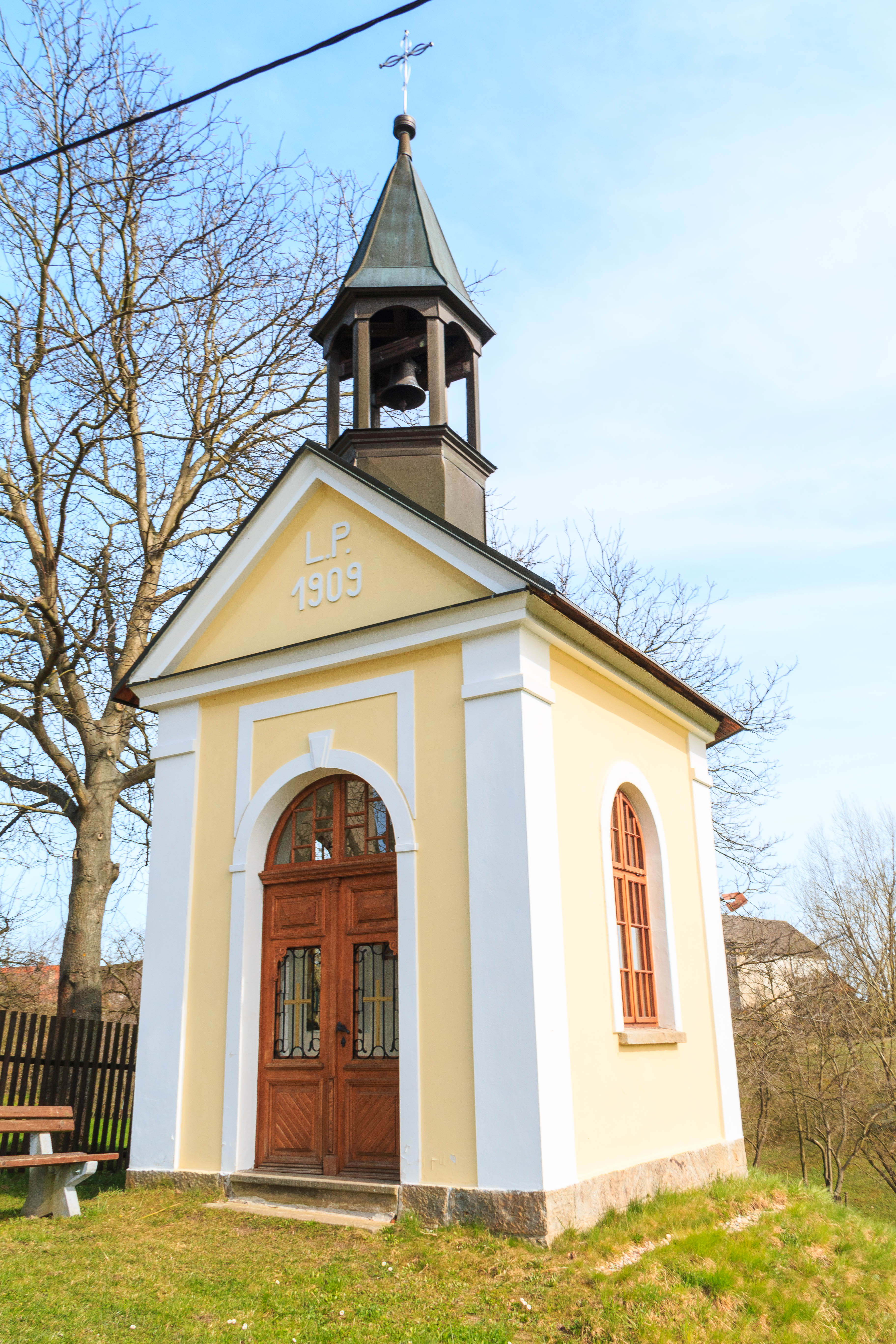 Kaple Nanebevzetí Panny Marie (Mečov)